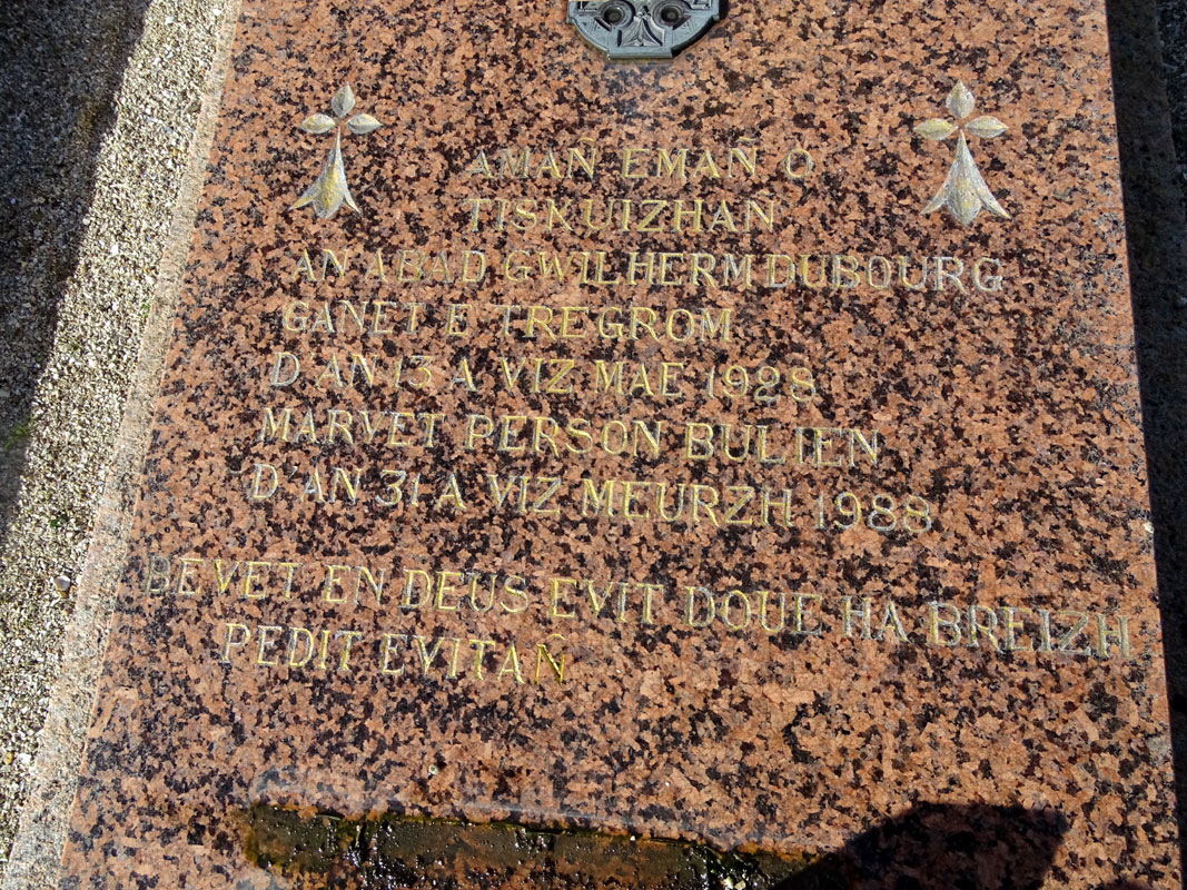 Dubourg Gwilherm. Maen bez. Rospezh